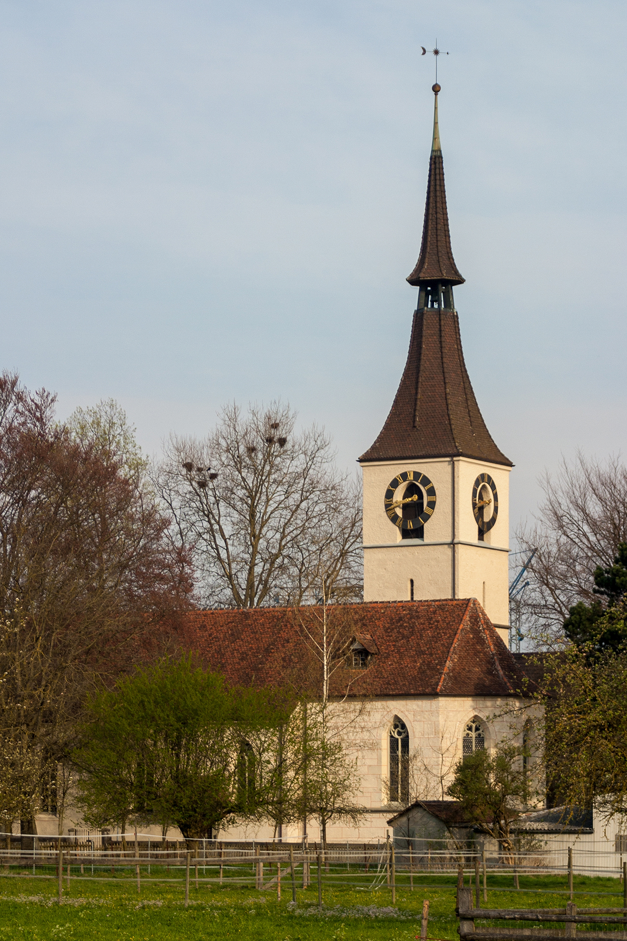 Reformierte Martinskirche in Utzensdorf (BE)